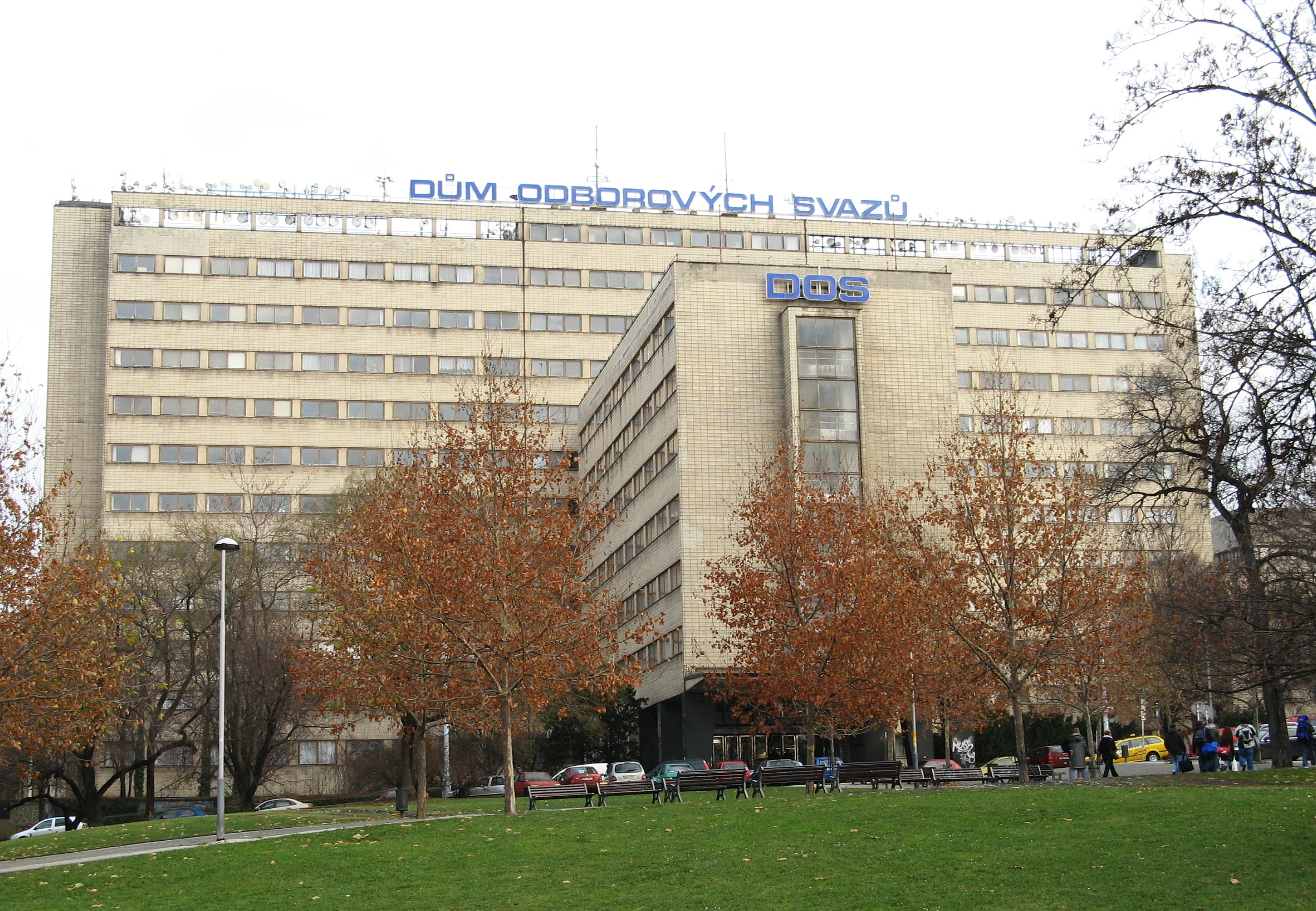 Dům odborových svazů na náměstí Winstona Churchila v Praze 3, před r. 1989 Ústřední rada odborů na náměstí Antonína Zápotockého v Praze 3, před druhou světovou válkou Pensijní ústav